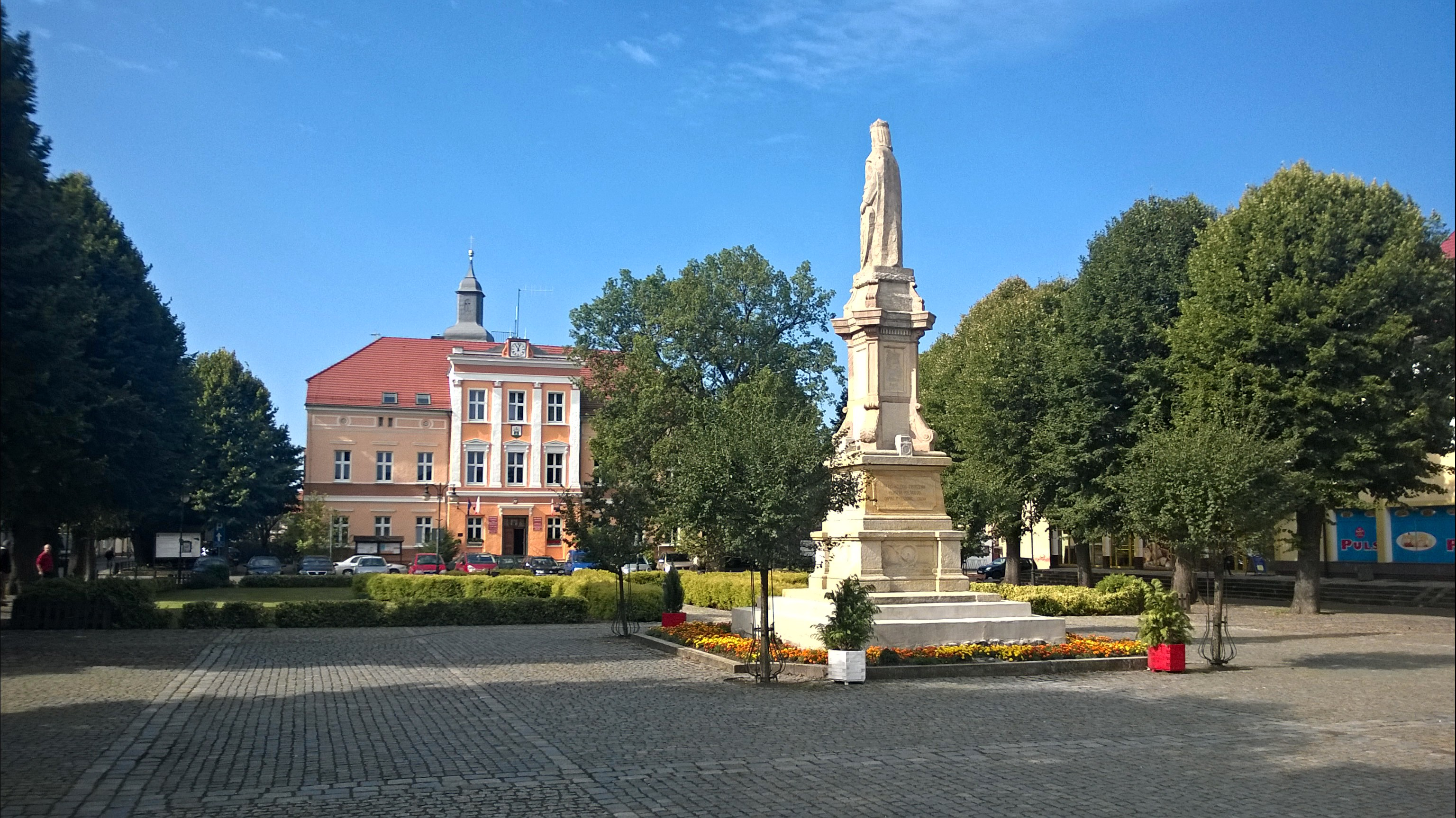 Mieszkowice